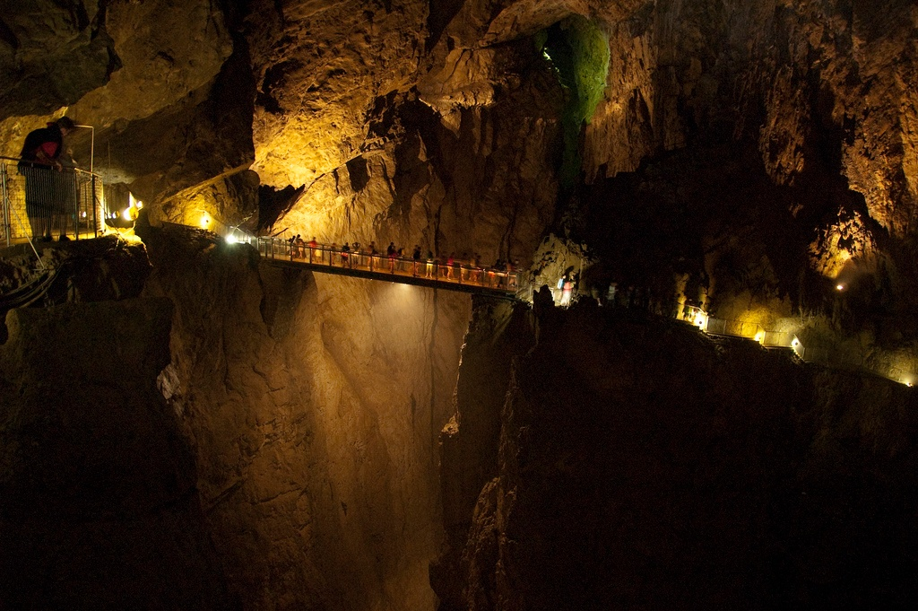 Grutas de Škocjan 003